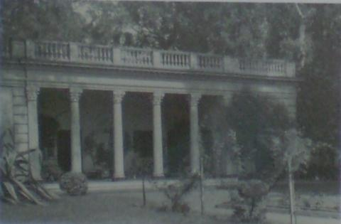 Fachada de la sede original del Museo Histórico de Buenos Aires Cornelio de Saavedra, muestra de la arquitectura de la segunda mitad del S XIX. Antigua residencia de Gregorio Lezama en San Telmo, hoy sede del Museo Histórico Nacional. Es fotografía tomada de un cartel exhibido en los jardines del museo para guía de los visitantes.